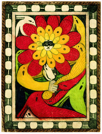 Skt.-Adolf-Thron, -Flühe-Blume, 1917. Bleistift und Farbstift auf Zeichenpapier, 28,9 x 21,8 cm; Adolf-Wölfli-Stiftung, Kunstmuseum Bern